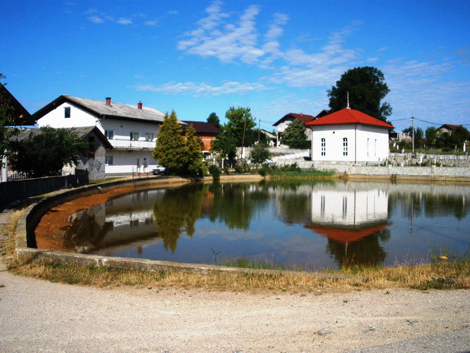 Jezero